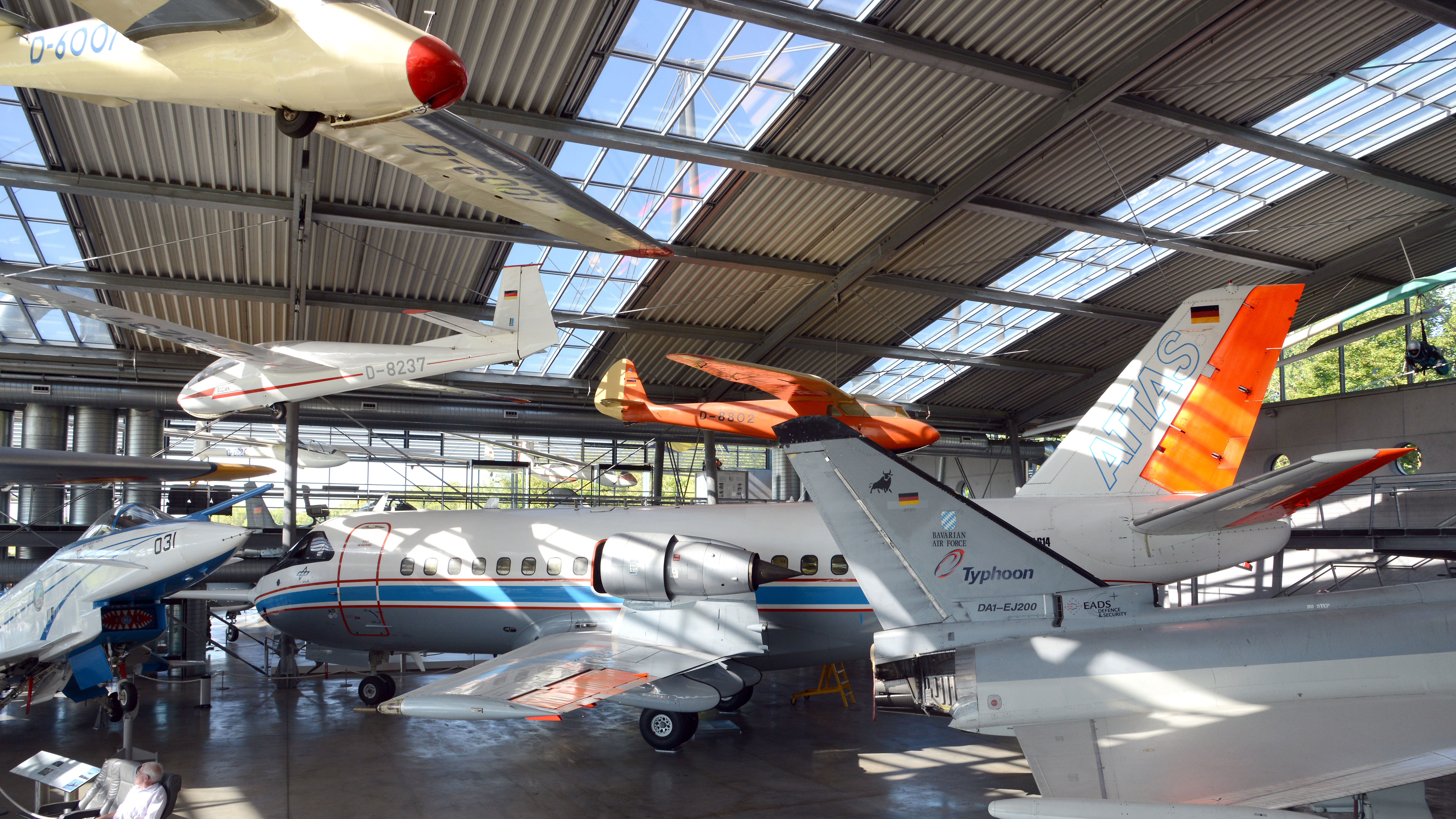 Erfahrene Restauratoren präparierten das einzigartige Exponat in den letzten Monaten. Fortan kann der ehemalige DLR-Flugversuchsträger in der großen Ausstellungshalle von den Museumsbesuchern aus nächster Nähe bestaunt werden.